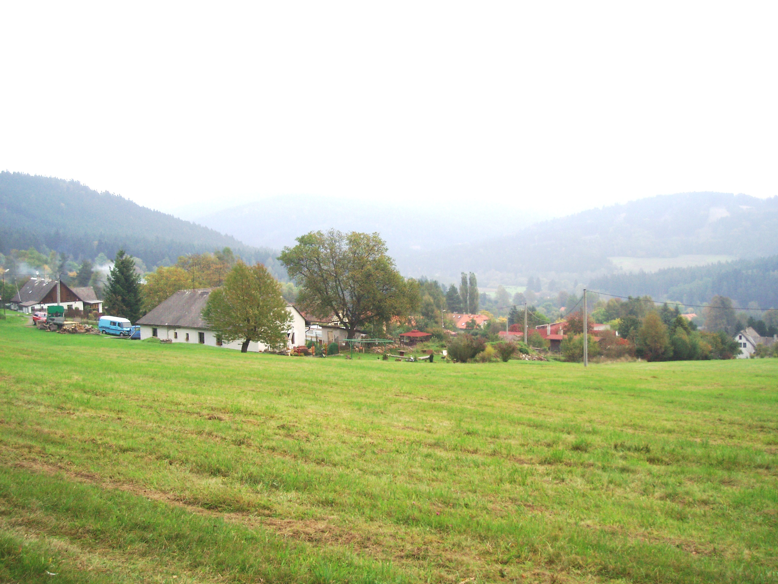 Dominikální Paseky,podbrdská ves